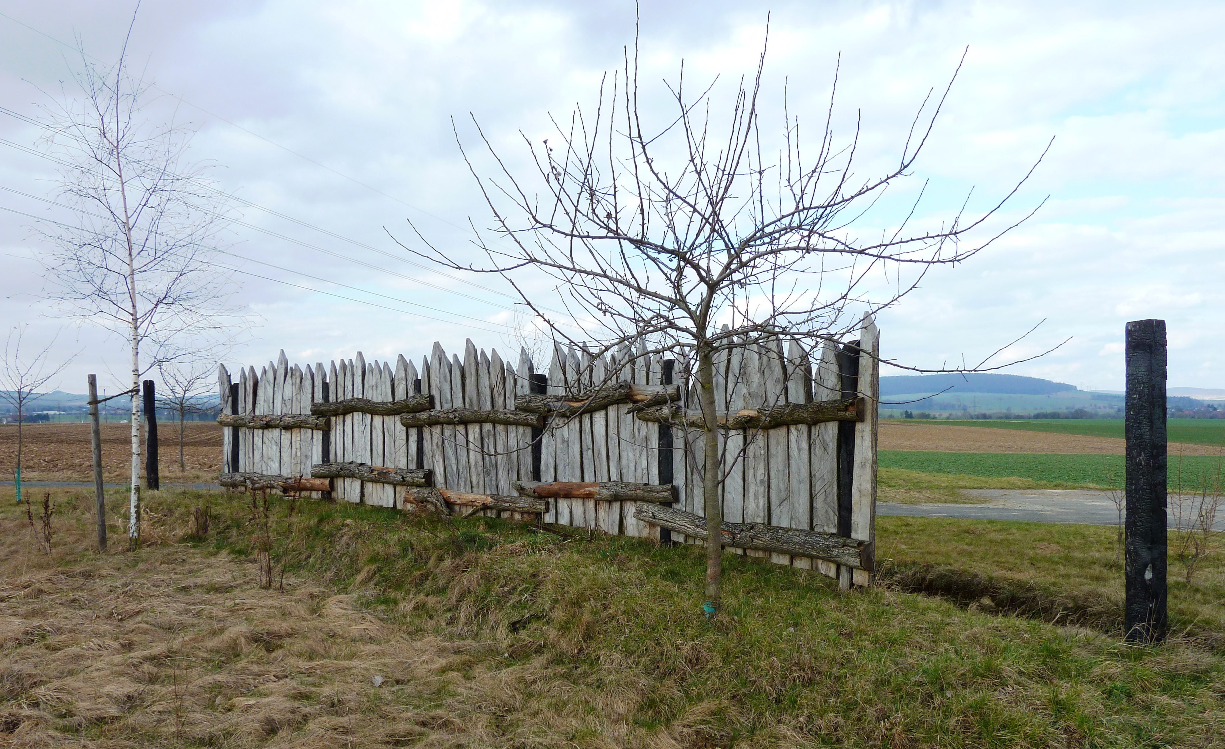 Rekonstruktion der Wall-/Grabenbefestigung eines archaeologisch nachgewiesenen Jungsteinzeitdorfes der Rössener Kultur (ca. 4700 v. Chr.) bei Großenrode, Stadt Moringen, Südniedersachsen